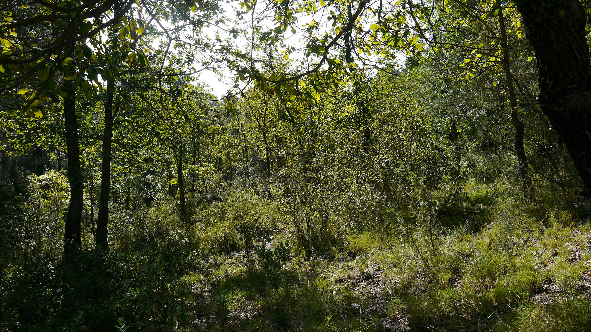 Bosquete de Quercus cansriensis de repoblación en Sierra Espuña, Región de Murcia (España).